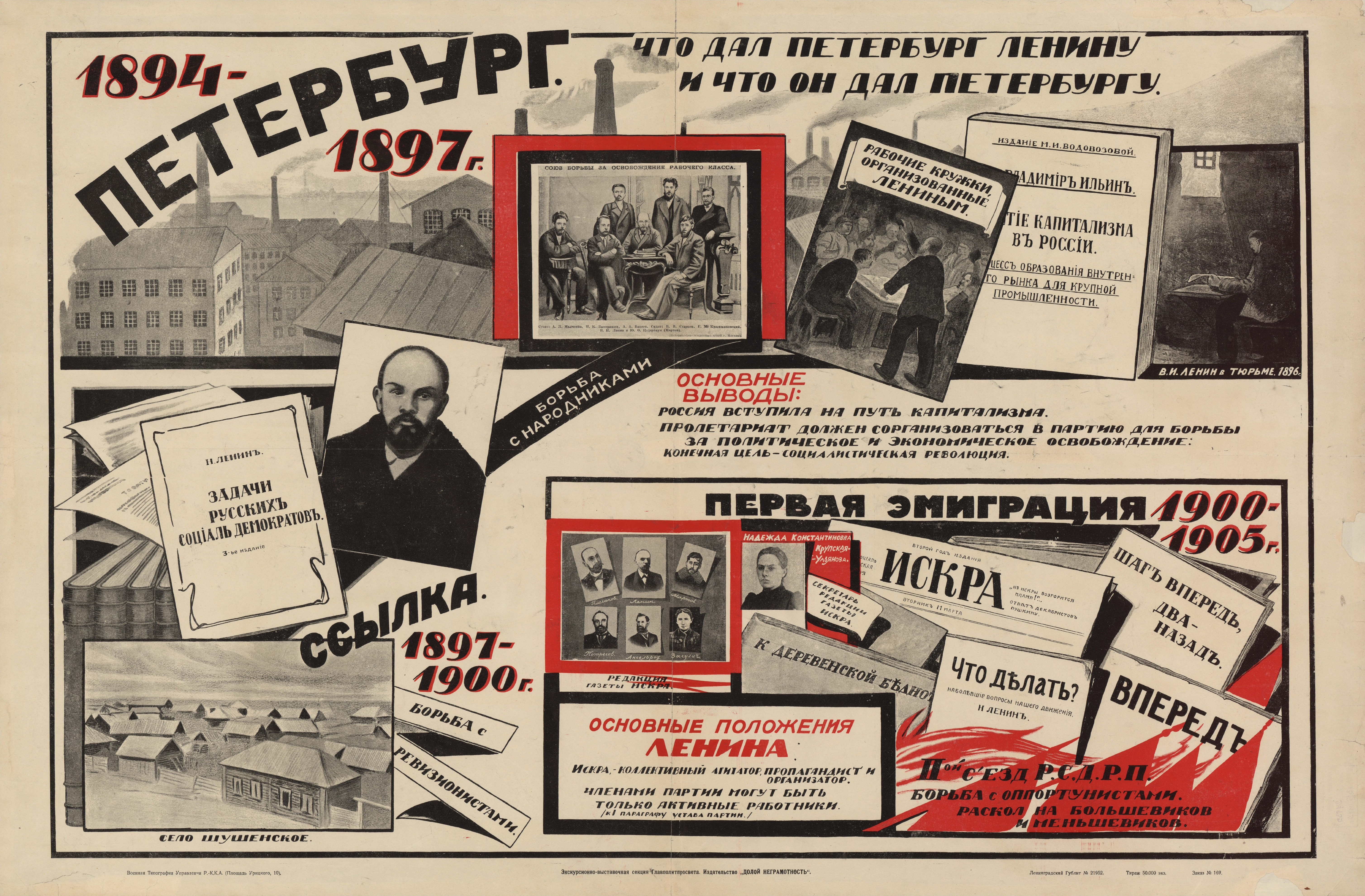 Что дал Петербург Ленину и что он дал Петербургу : [плакат] / Экскурсионно-выставочная секция Главполитпросвета ; худож. неизв. — [Ленинград] : Долой неграмотность, [1925] ([Ленинград] : Военная типография управления РККА). — Цветная литография, 1 лист, 71 × 107 см. — 50 000 экз.